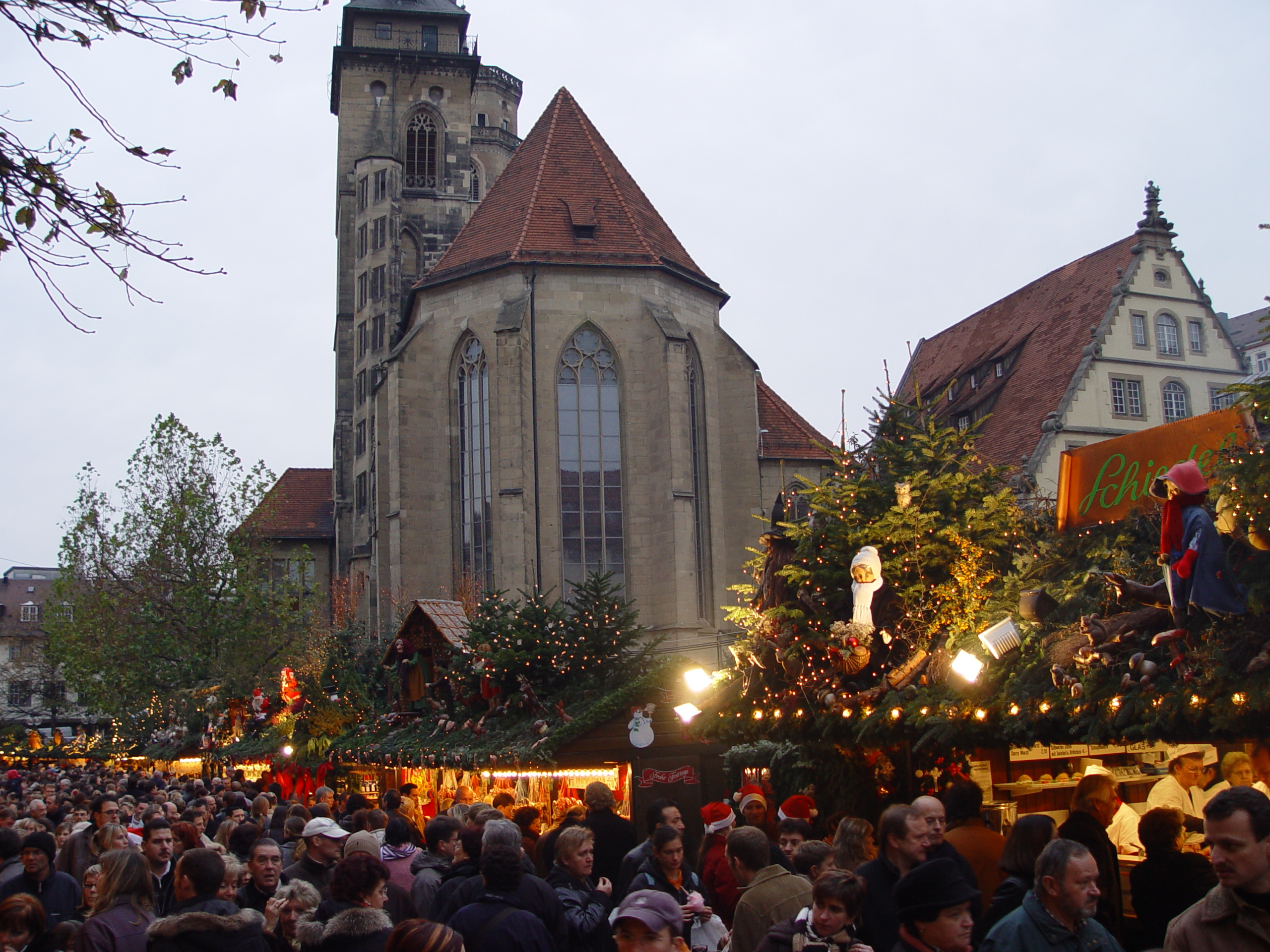 Weihnachtsmarkt Stuttgart 2004, Schillerplatz mit Blick auf Stiftskirche. Kategorie:Stuttgart